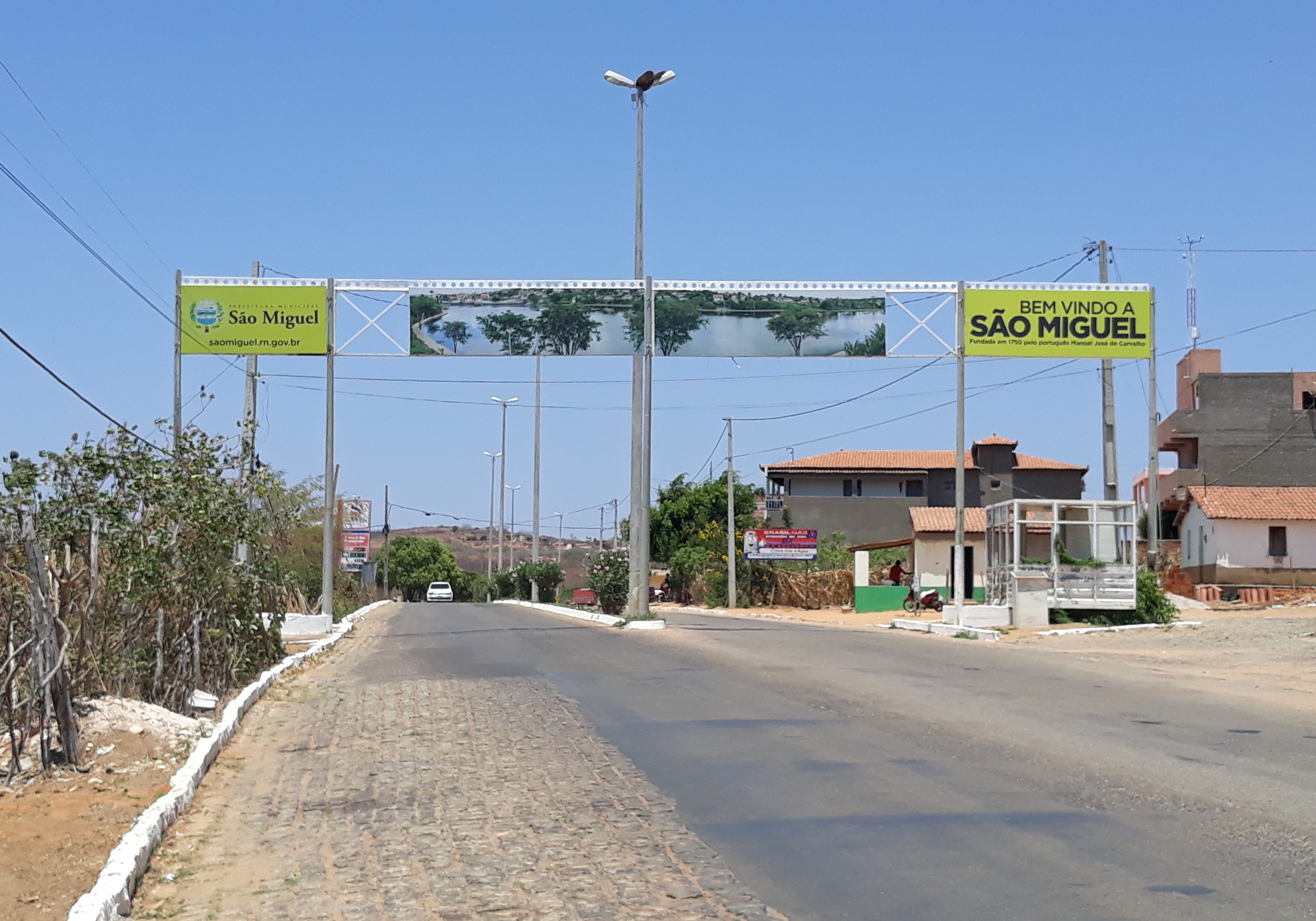 Português do Brasil: Pórtico de entrada de São Miguel, Rio Grande do Norte (Brasil), na rodovia estadual RN-177.